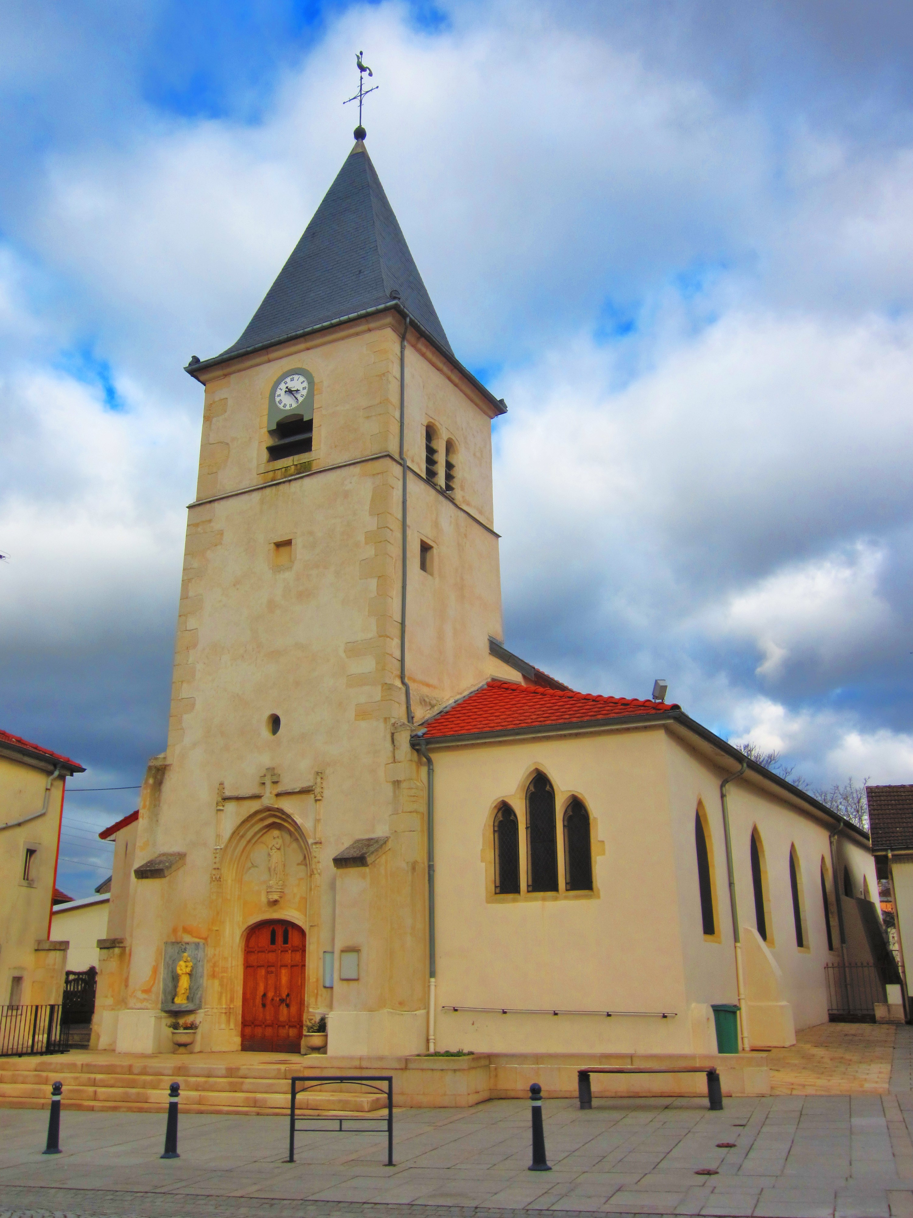 Laneuveville eglise